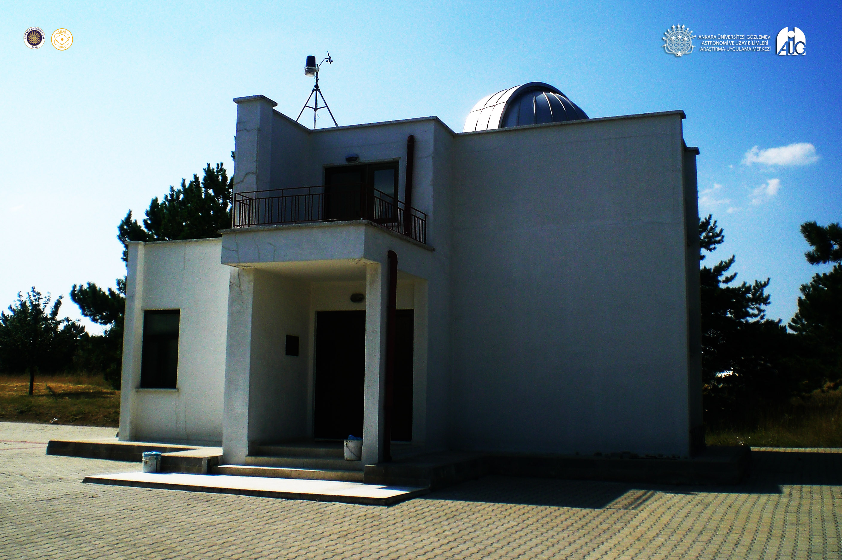 AUG T40 Teleskobu